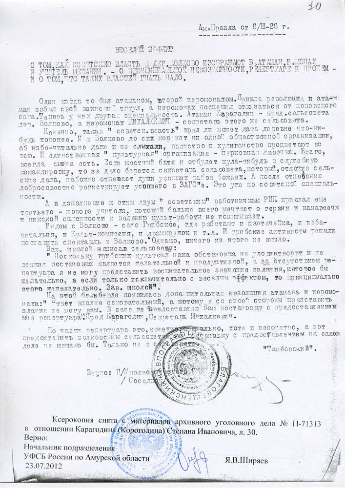 Обличительная статья большевистской прессы, направленная на дискредитацию администрации с. Волково Амурской области; а именно: Карагодина Степана Ивановича (председателя сельсовета, атамана), секретаря сельсовета Михалевич и заведующего школой (бывшего священника). В статье так же отражено сельское противостояние между с. Волково и с. Грибское. Источник